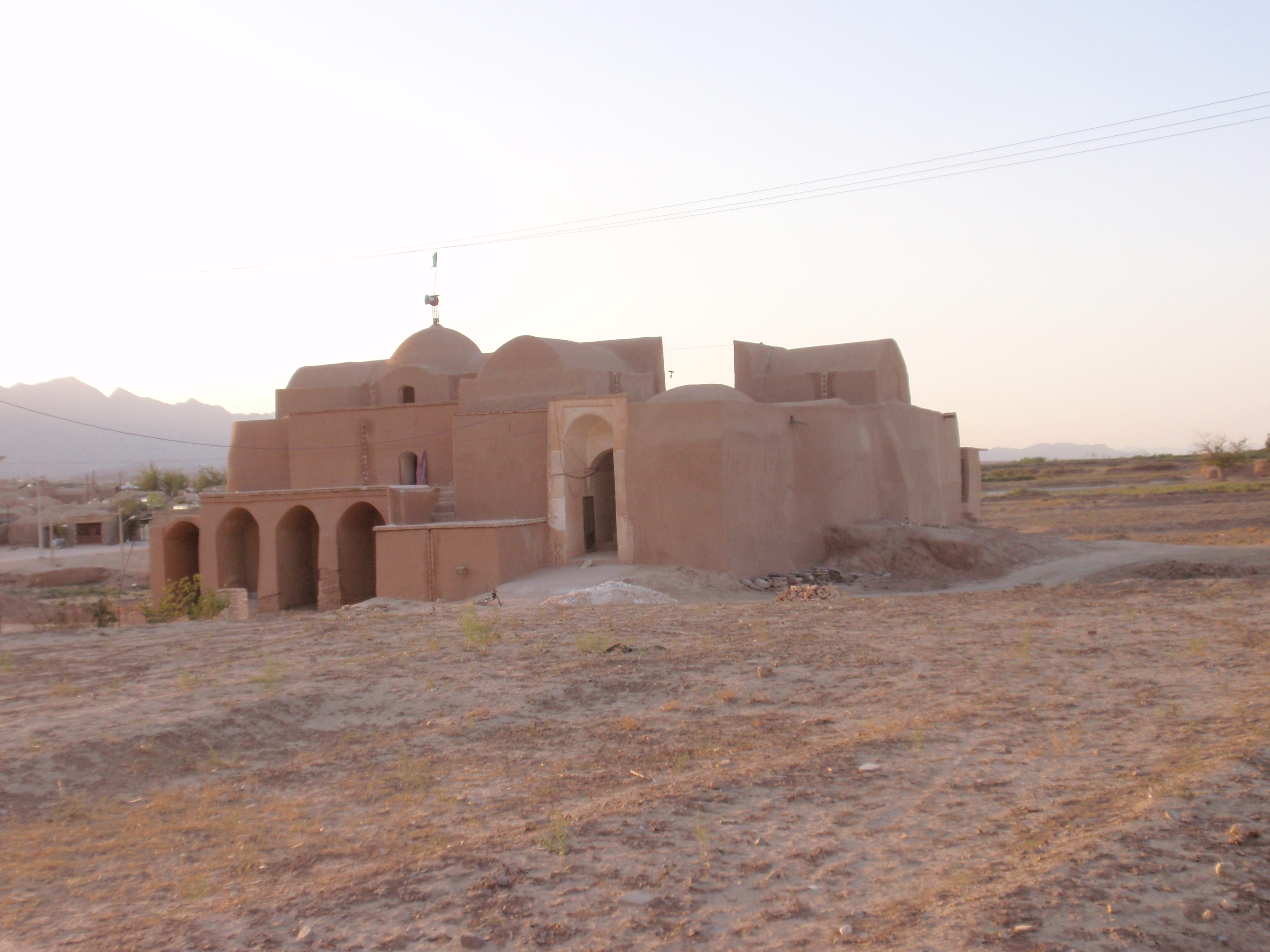 مسجد جامع رقه